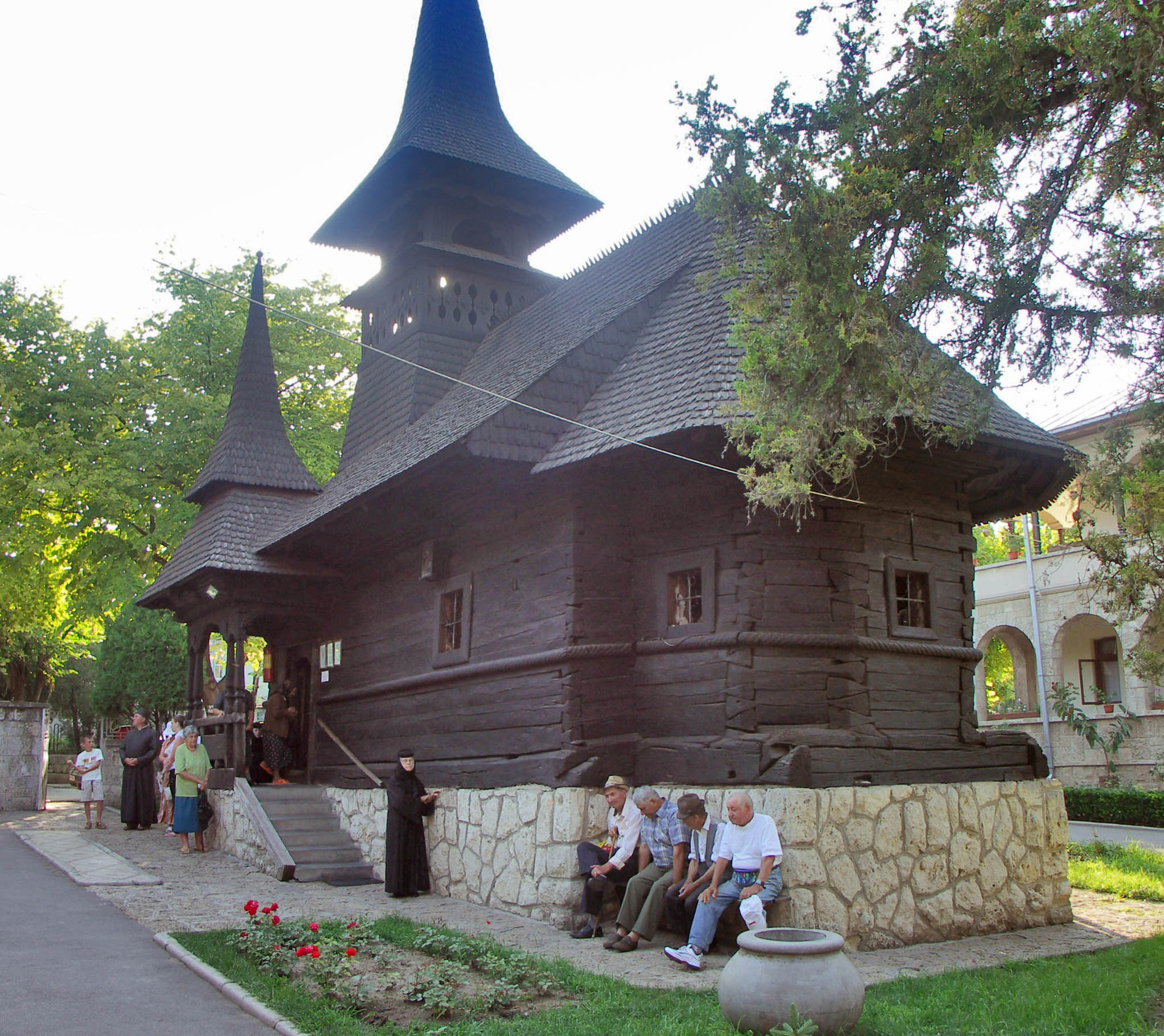 Biserica de lemn din satul Maiorești, comuna Rușii-Munți, județul Mureș, mutată în orașul Techirgiol, județul Constanța. Vedere dinspre sud-est.